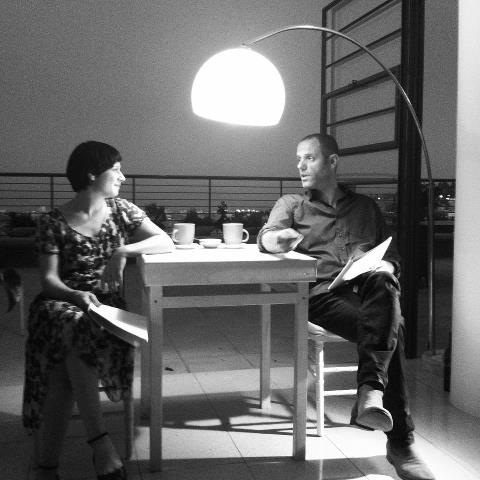 היום בו נקבר מרטין בובר (2011) - תיאטרון קריאה של עמנואלה עמיחי